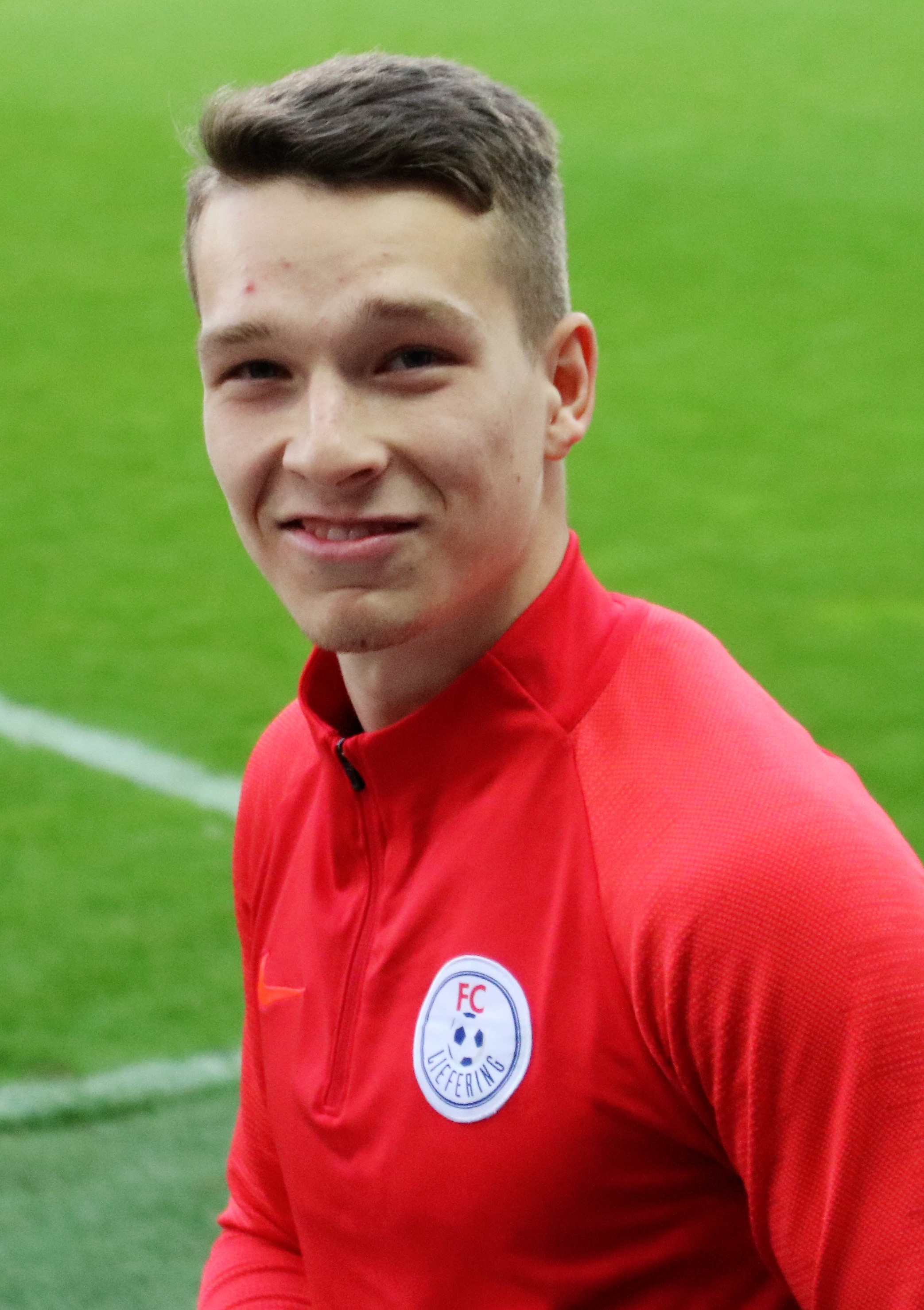 Soccer player FC Liefering